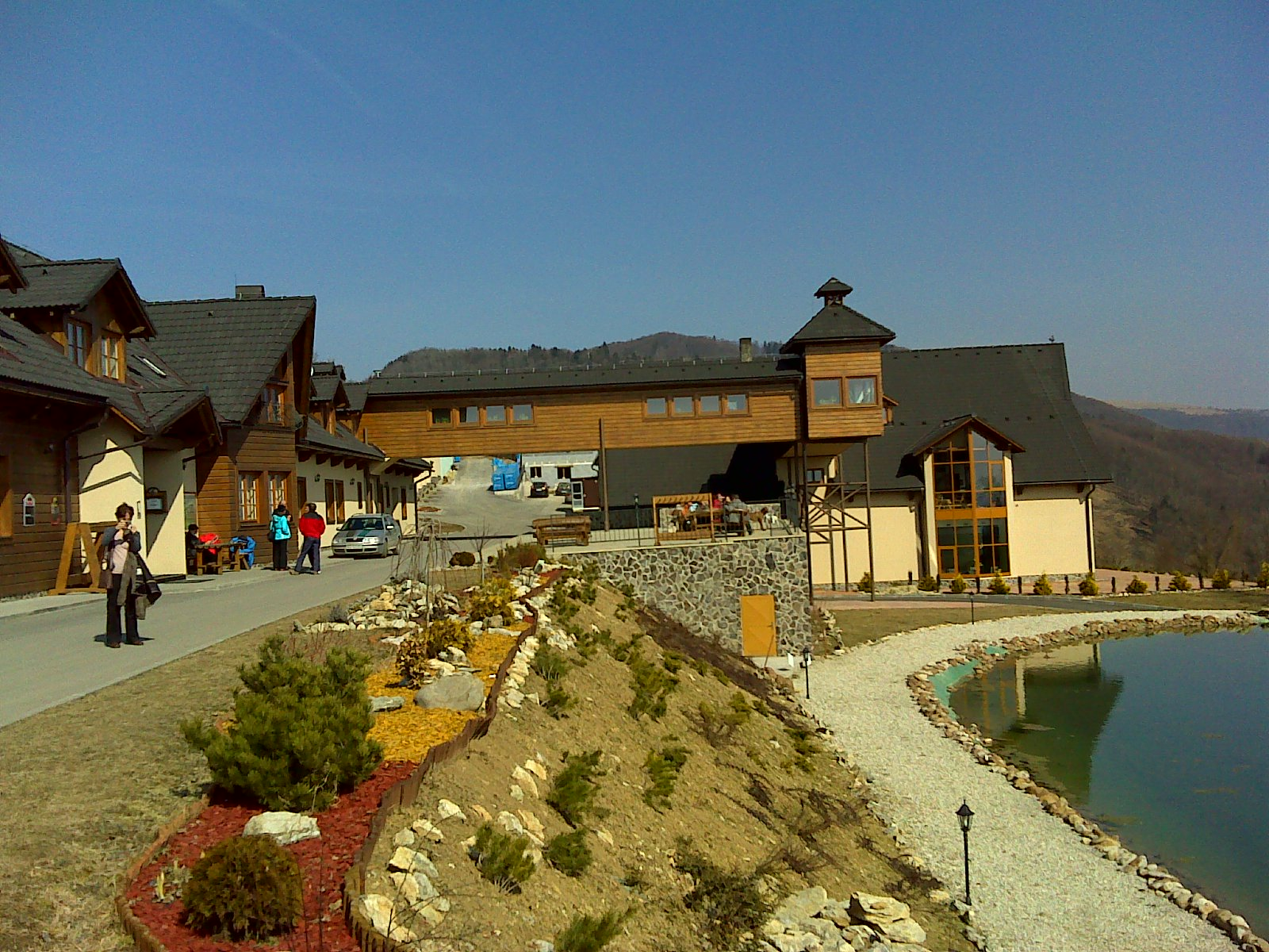 Hotel Fugerov Dvor